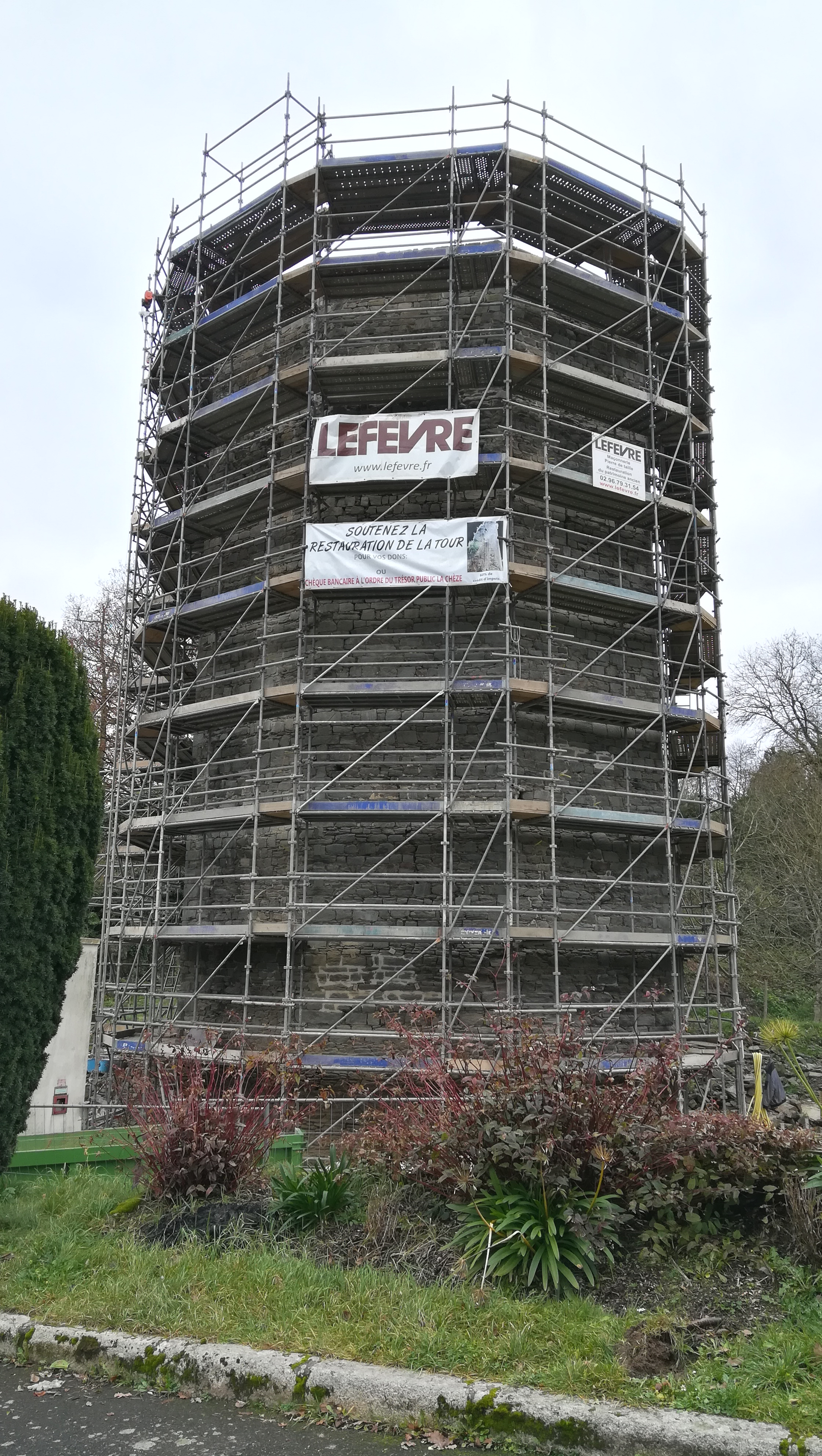 Tour du Chateau de La Chèze (en rénovation)